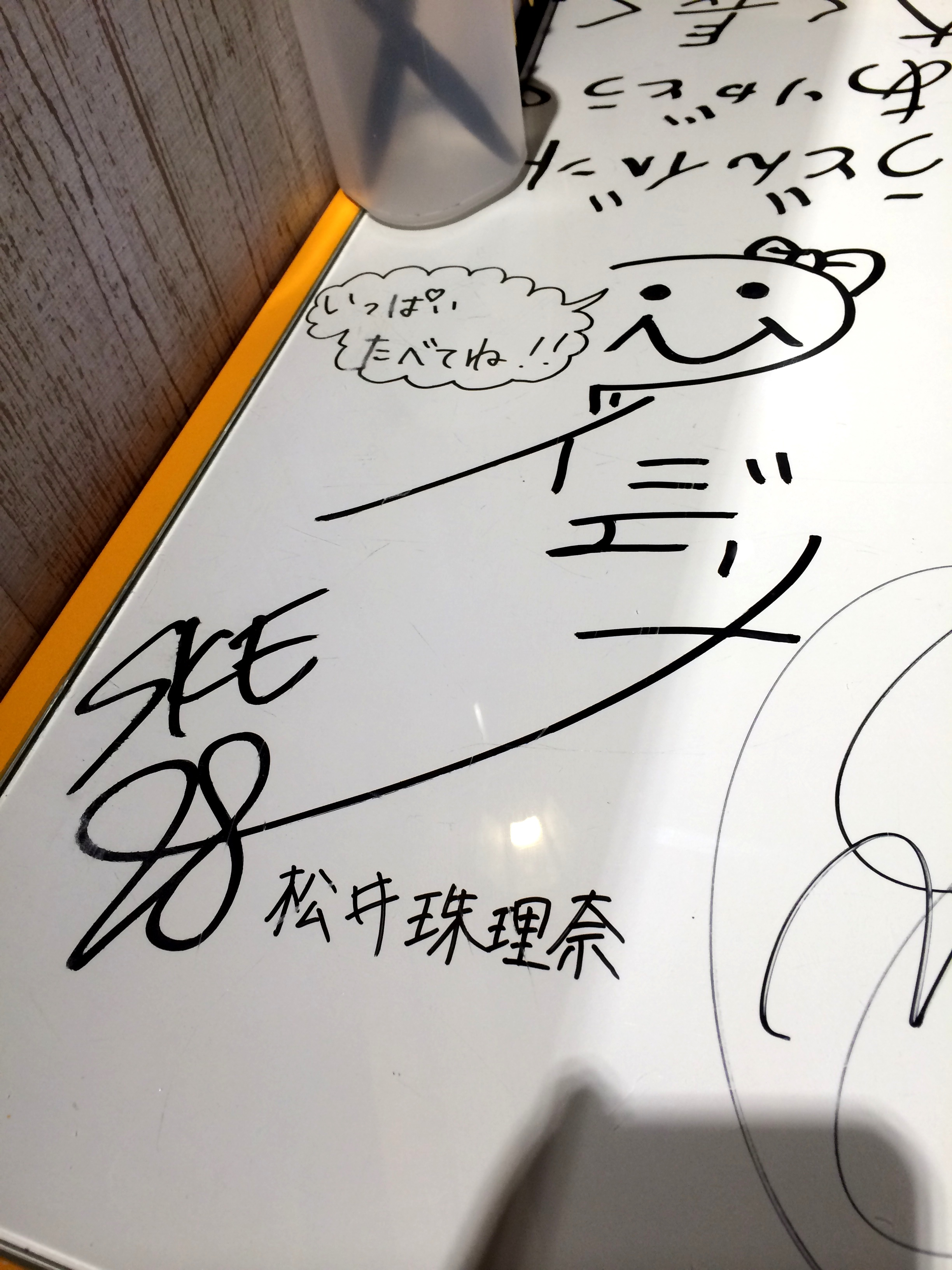 SKE48成員松井珠理奈的簽名。